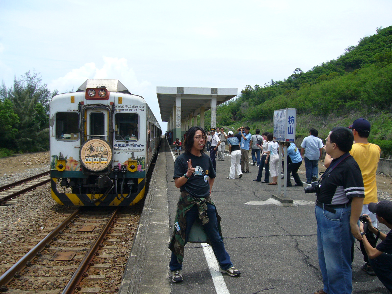 自強號停在枋山站。